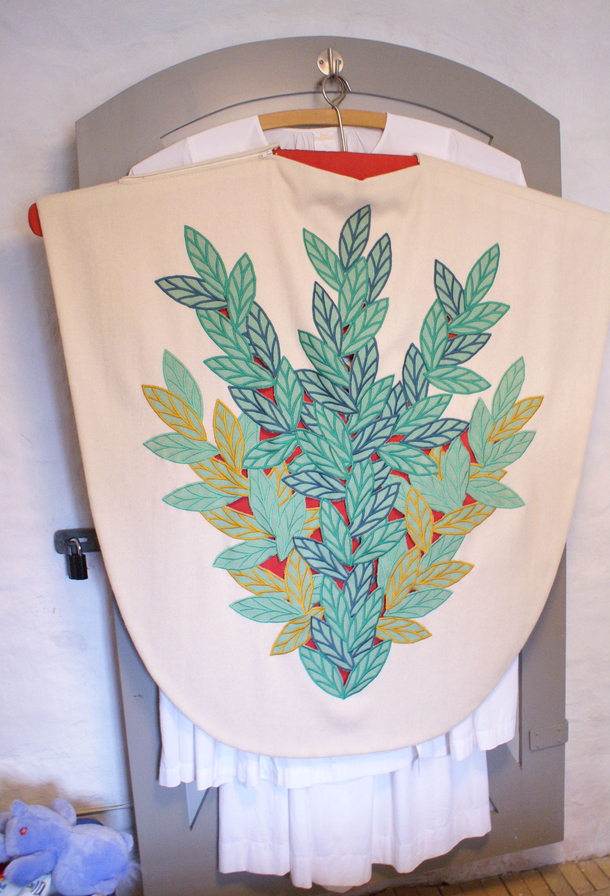 Odden Kirke, messehagel